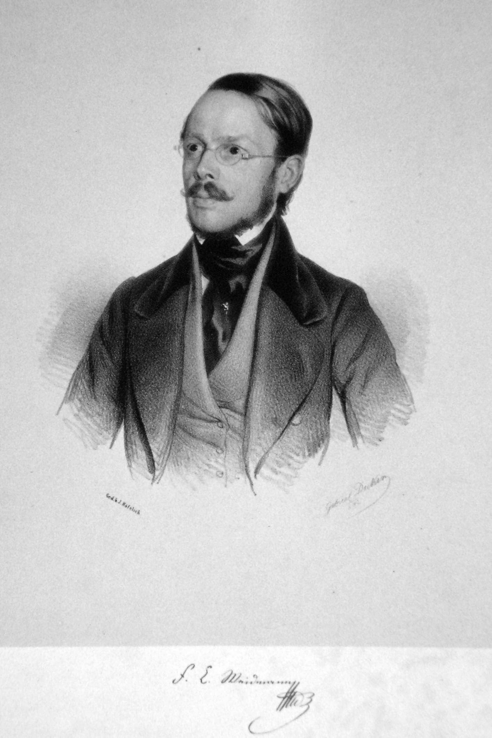 Franz Karl Weidmann (1787-1867), österreichischer Schriftsteller, Journalist und Schauspieler. Lithographie von Gabriel Decker, 1842